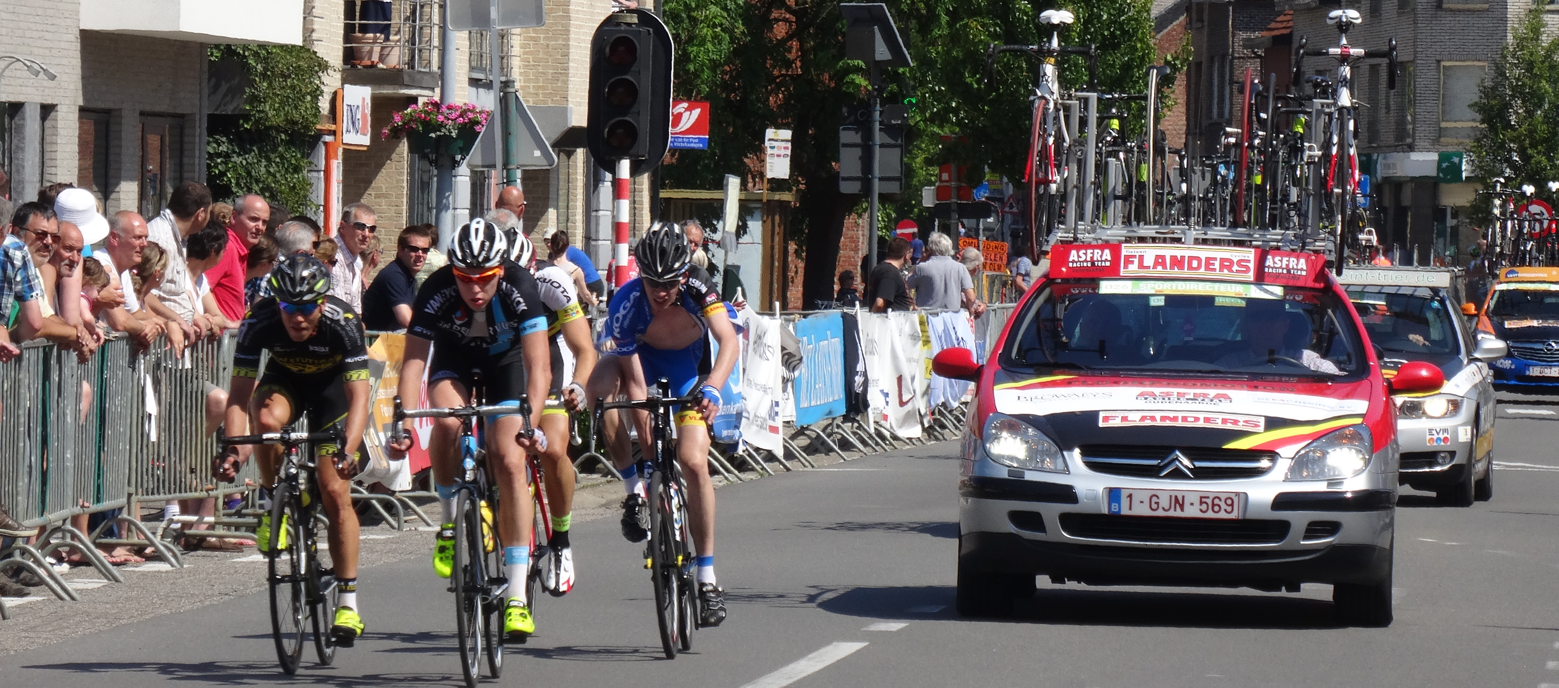 Reportage photographique réalisé le dimanche 8 juin à l'occasion de l'arrivée du Mémorial Philippe Van Coningsloo 2014 à Bonheiden, Belgique.